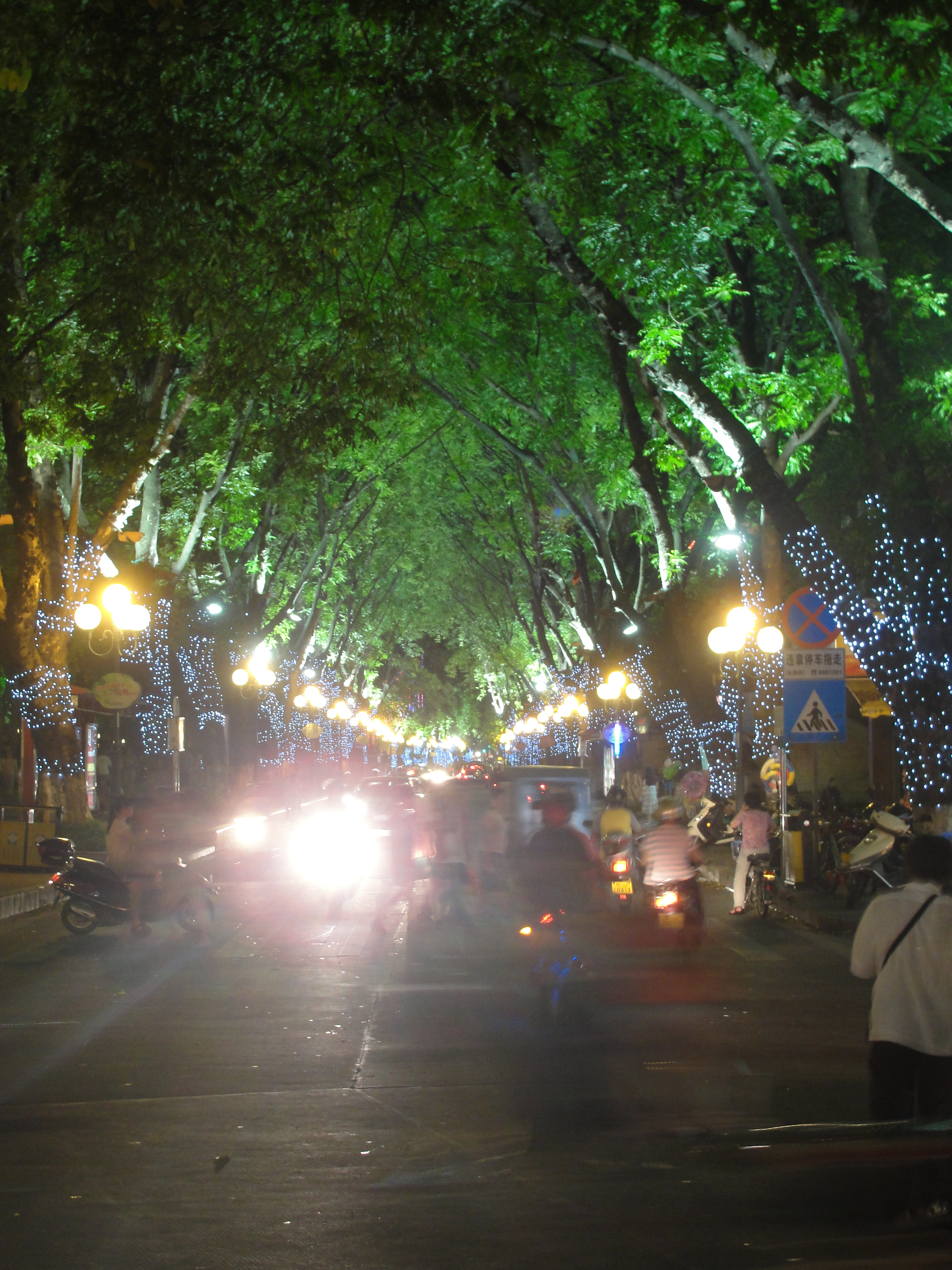 中文（中国大陆）: 江门市新会区公园路，由于道路历史悠久，两侧绿化受的破坏较少，形成了极佳的植被覆盖，可是由于道路狭窄，车行缓慢